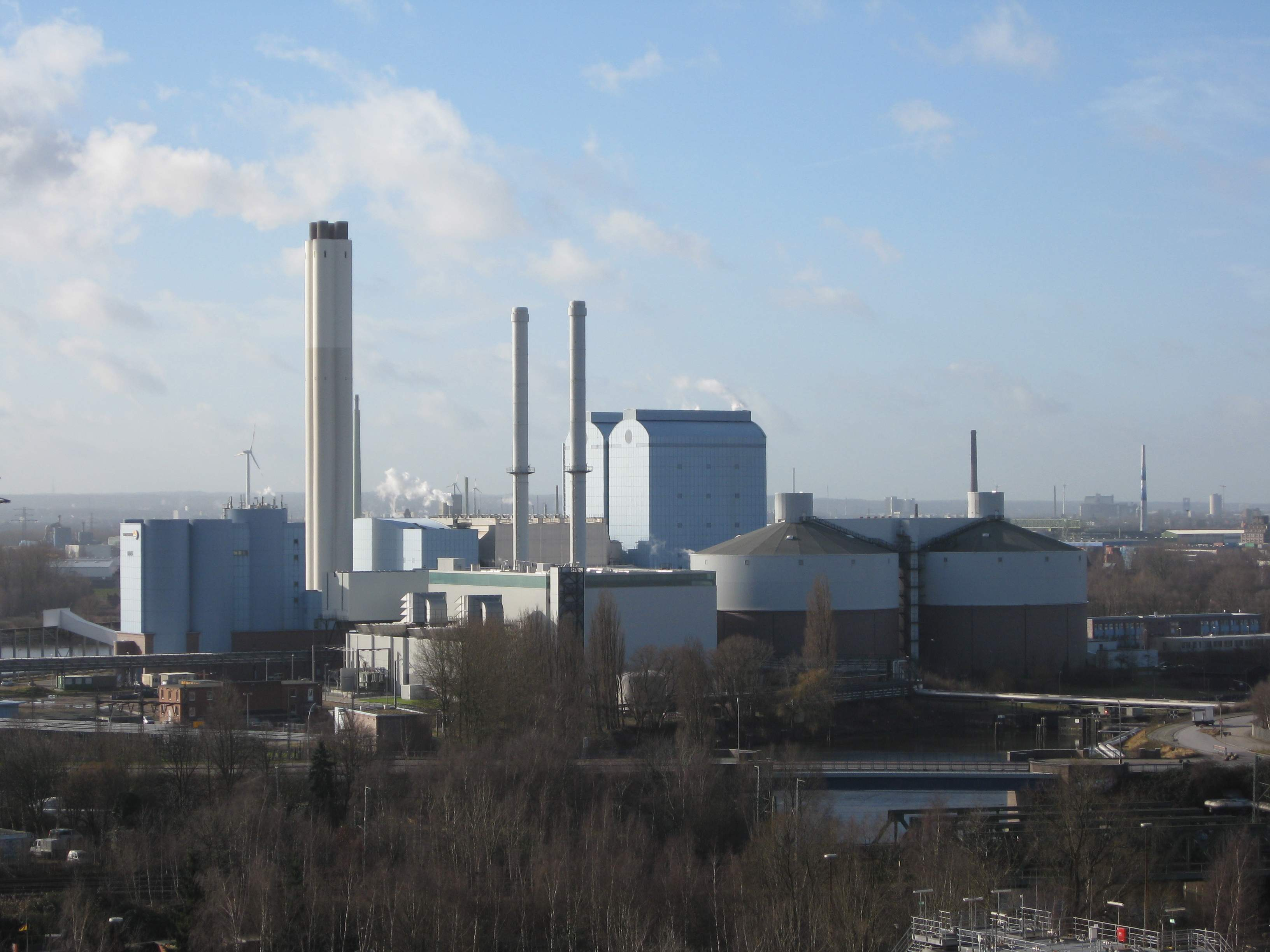 Kraftwerk Tiefstack in Billbrook.